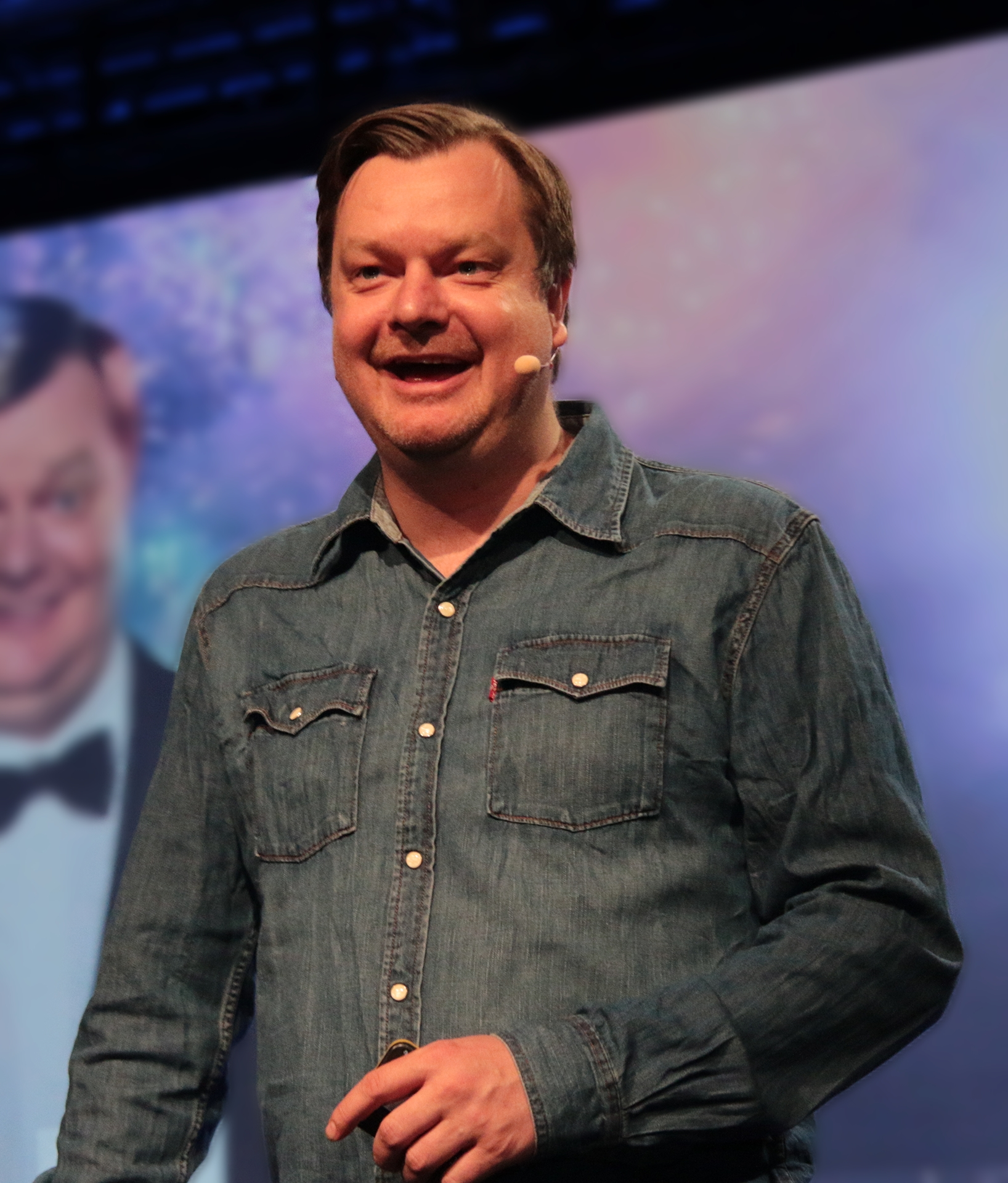 Medvirkende: Espen PA Lervaag, Håkon Bast Mossige, Moderator: Nils Stokke fra Spark AS